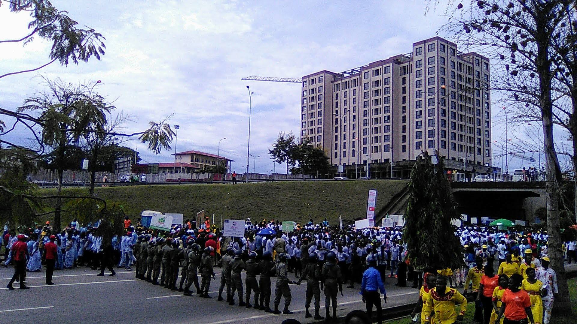 La fête internationale du travail n'a pas eu lieu cette année 2020 en raison de la pandémie de COVID-19. Voici des images de ce qui s'est passé l'année dernière à Douala Cameroun